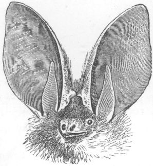 Bat face, Plecotus auritus